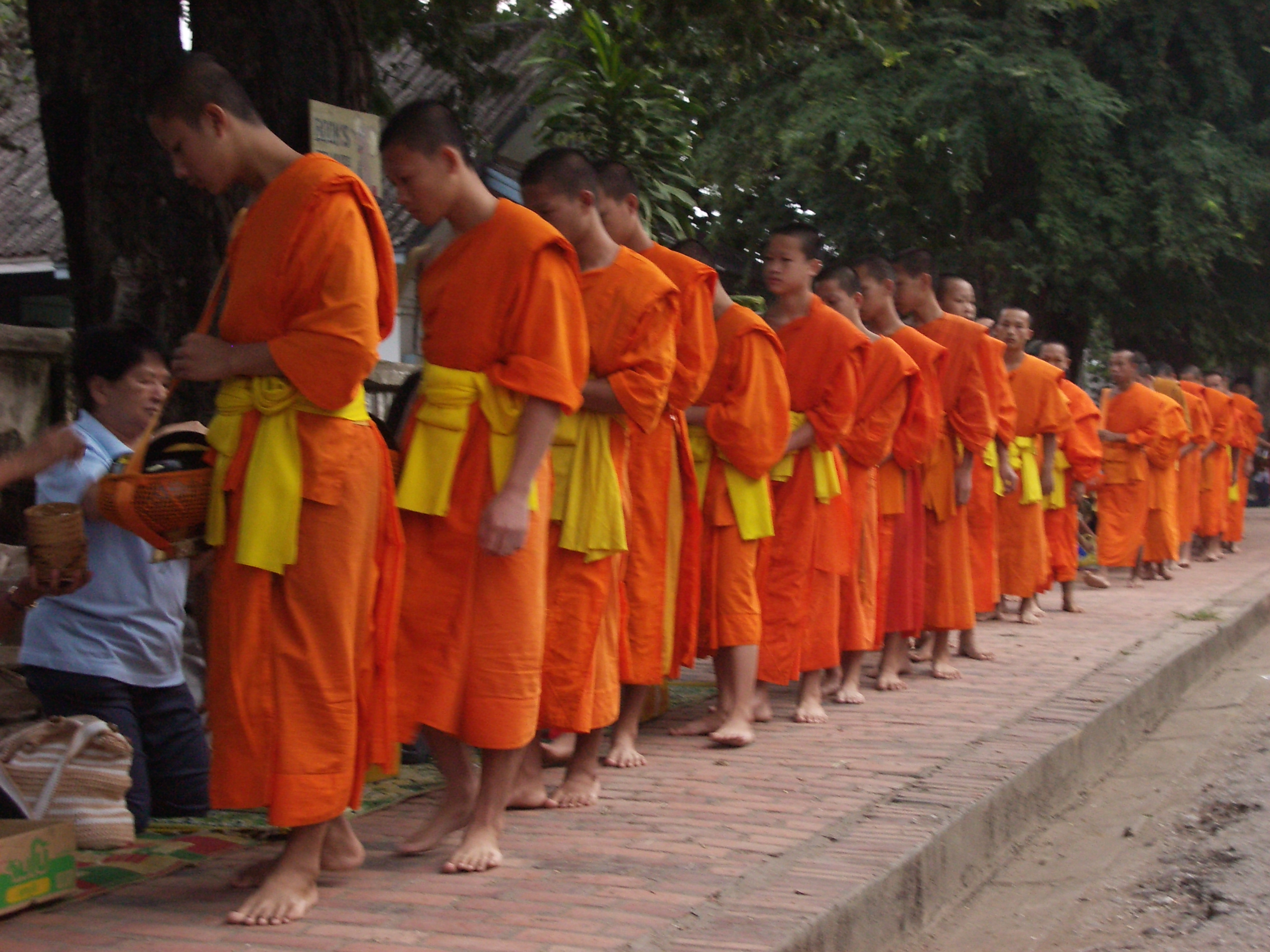 Aumone matinale de moines à Luang Prabang